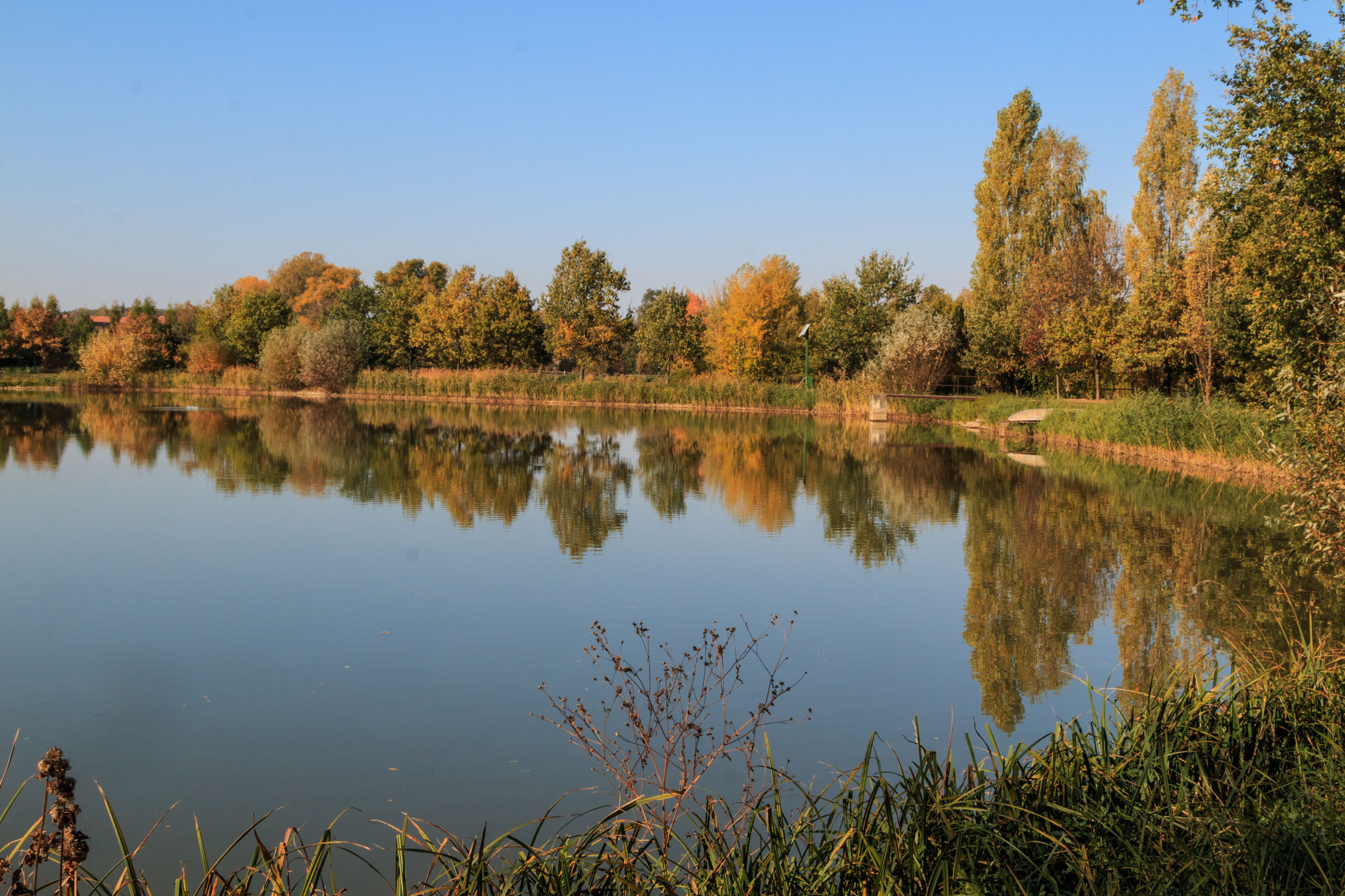 Rybníky u Bítovan Project: Vodstvo Ticket: 1617.